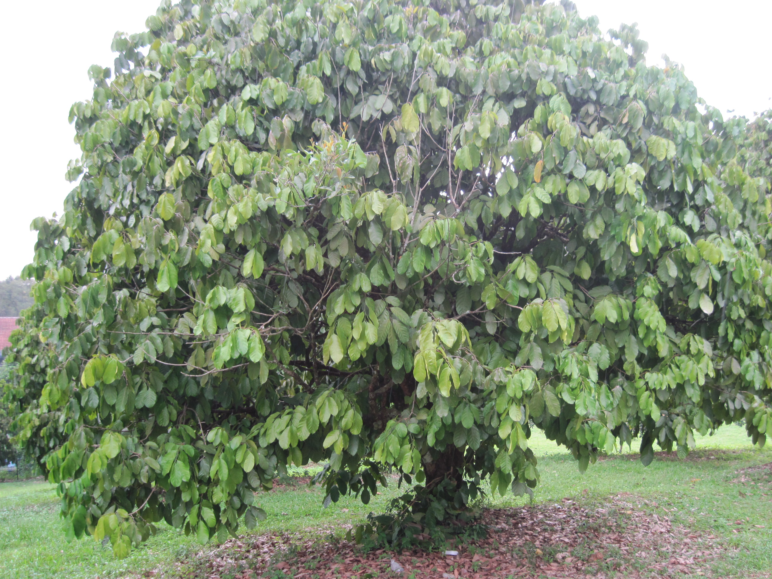 Pokok duku langsat.